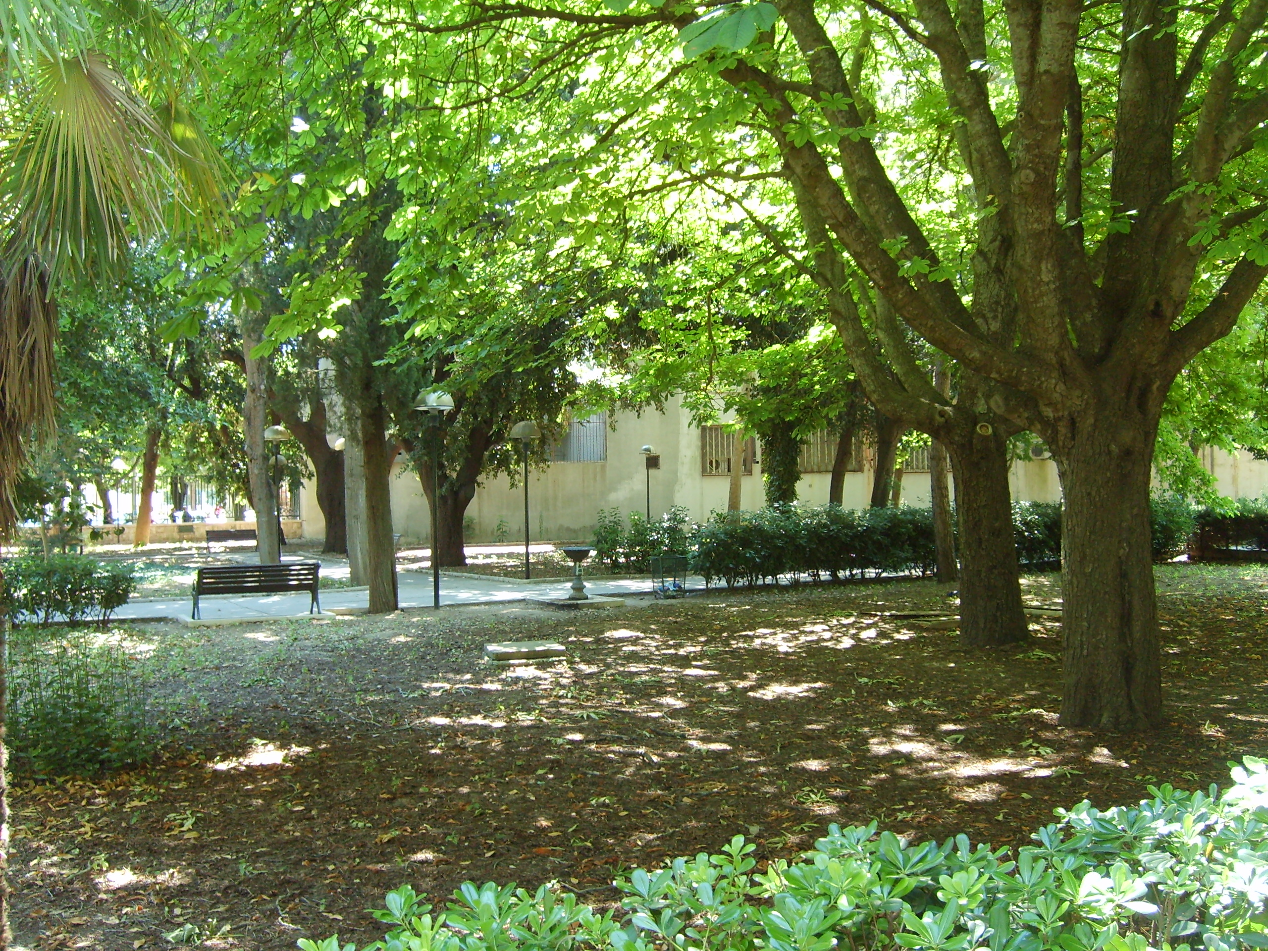 Vista dei giardini pubblici